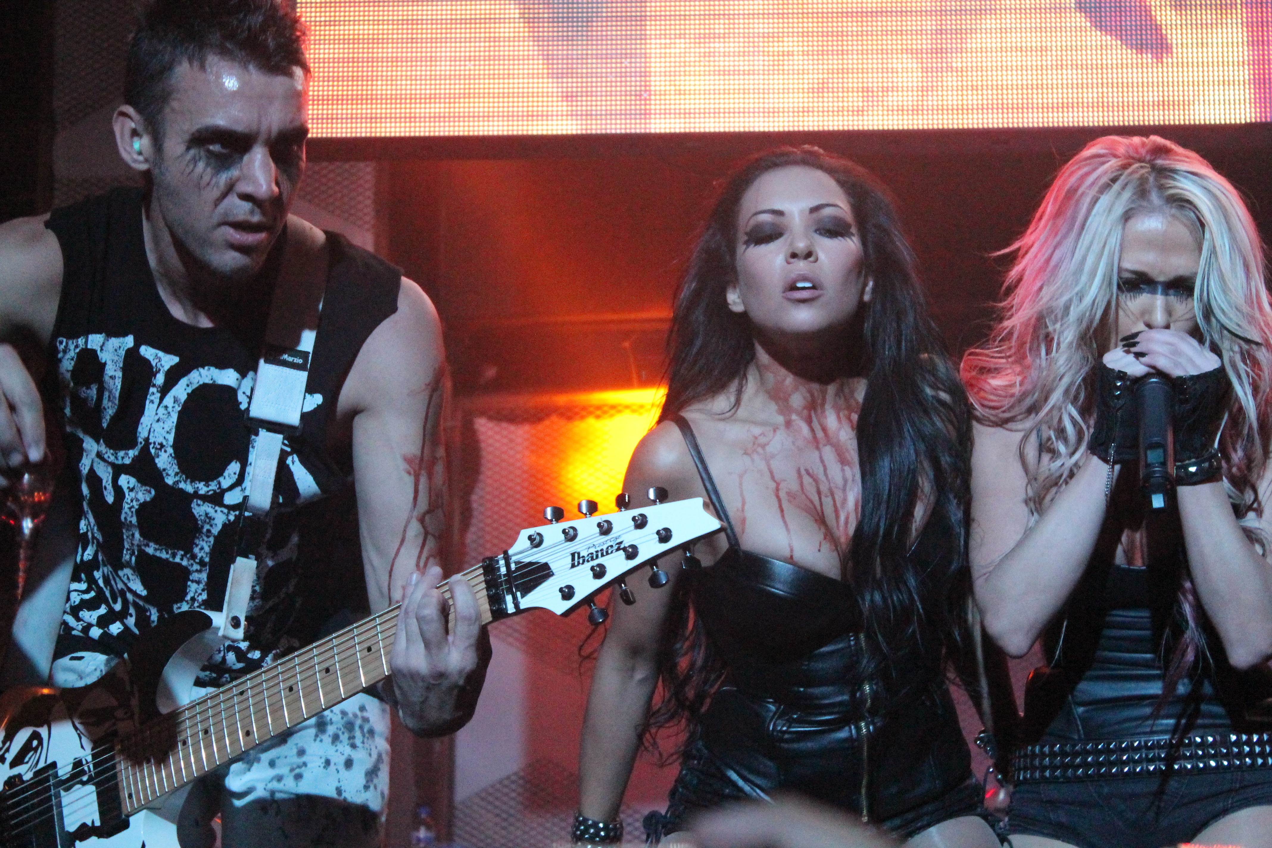 Butcher Babies / Cherry Strike